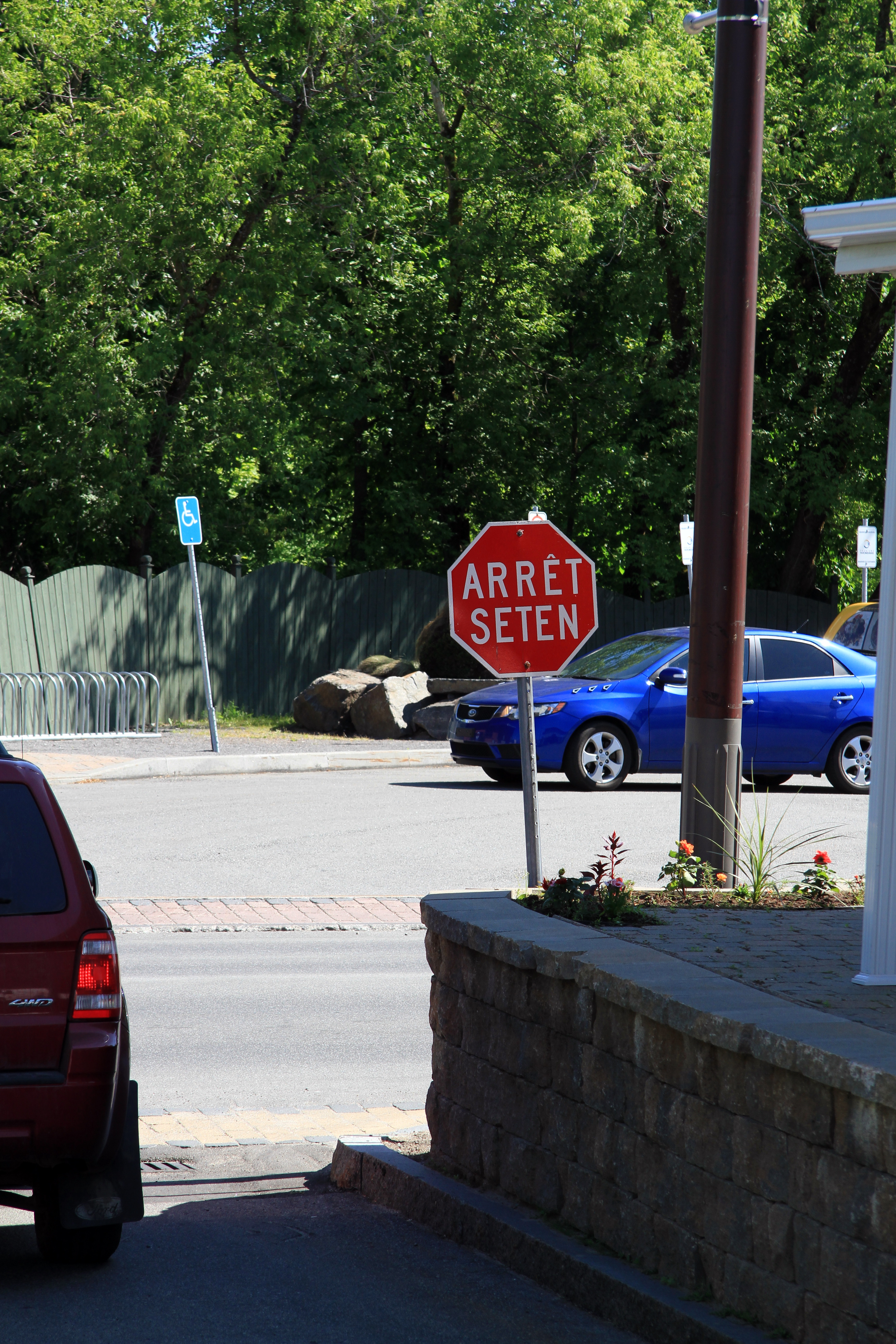 Nation Huronne-Wendat